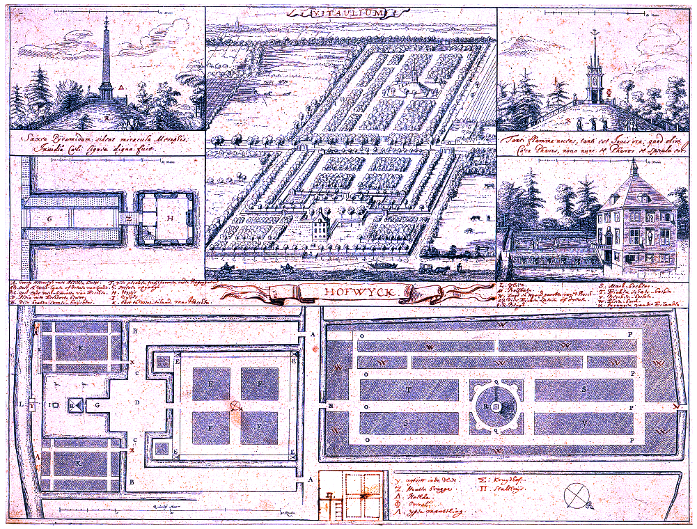 Vitaulium, drawing of Hofwijck and its garden plans